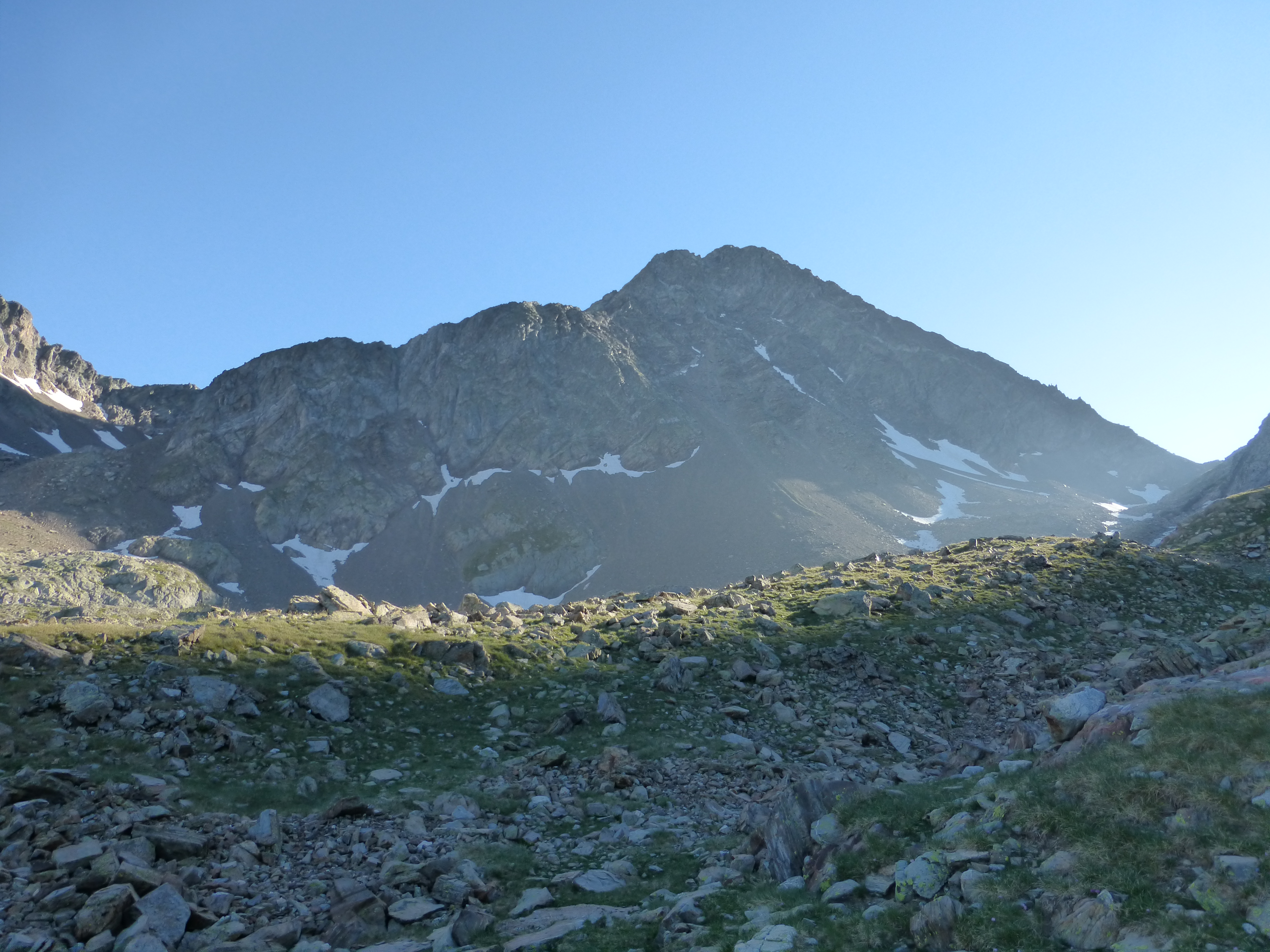 Face est de la Grande fache (3005m) et col de la Fache (2664m) à droite, vue depuis les lacs de la Fache.